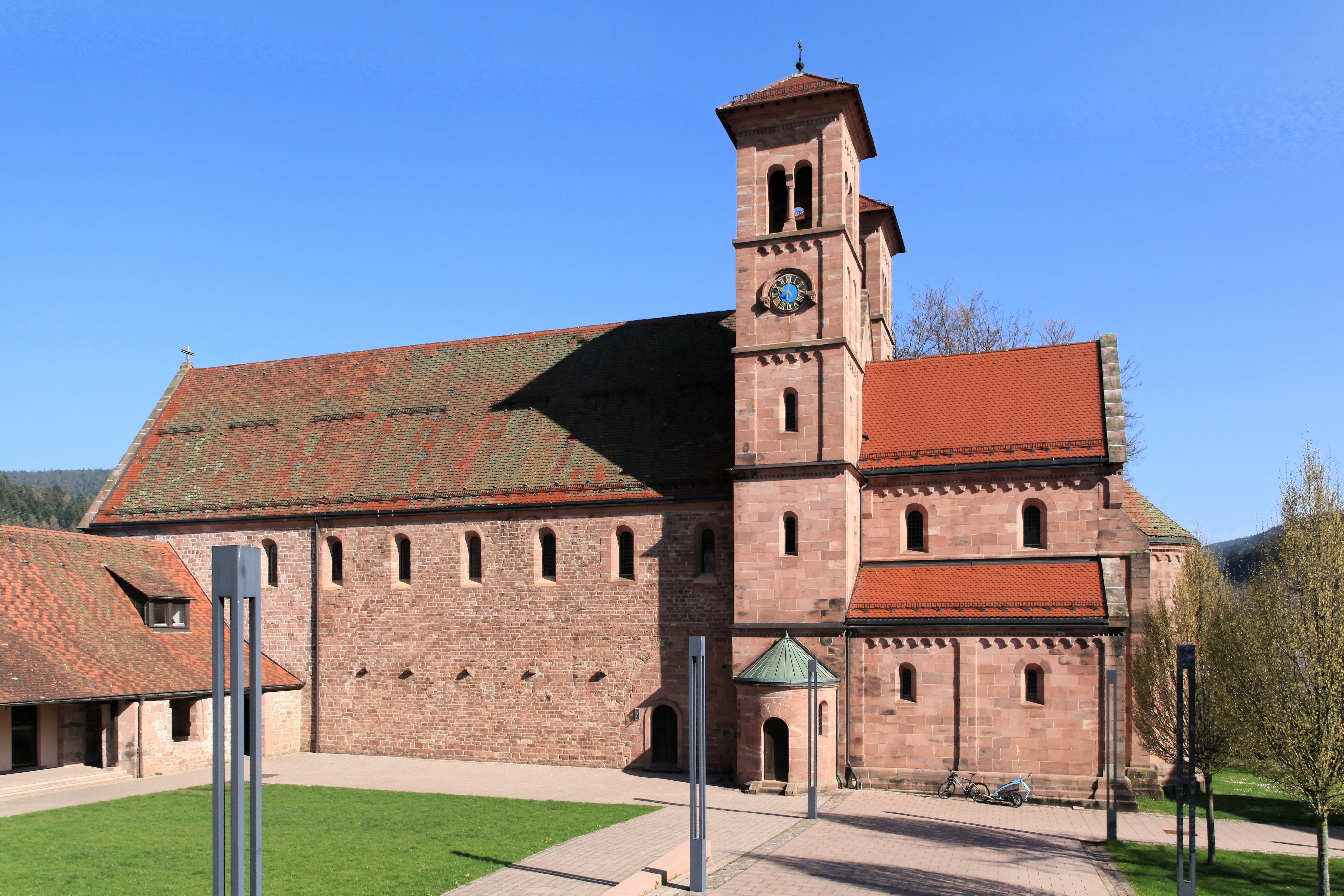 Evangelische Kirche Klosterreichenbach, früher Klosterkirche des Klosters Reichenbach, Am Klosterhof in Klosterreichenbach, Baiersbronn